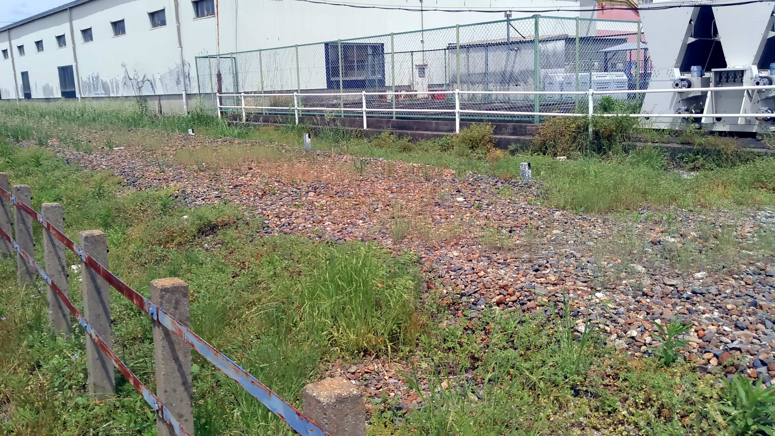 麻生駅跡。杭でしか名残が残っていなかった。